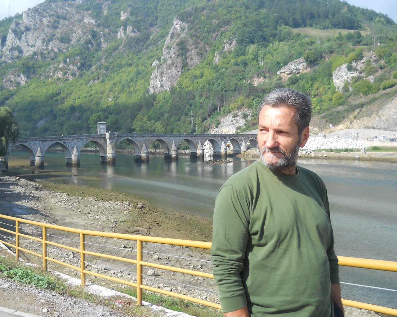 Милош Милићевић у Вишеграду